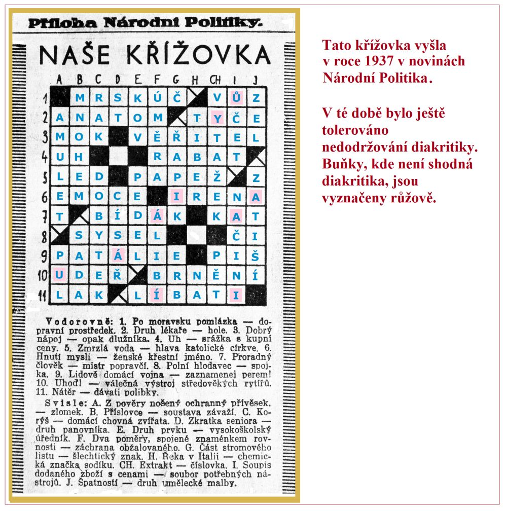 Starší křížovka v češtině, v níž není dodržována shoda diakritiky.